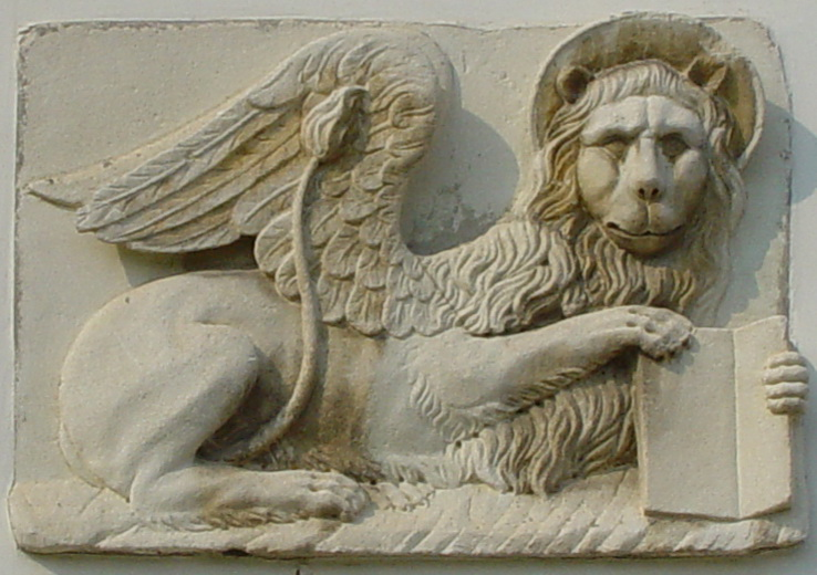 Mirano: altorilievo del Leone di San Marco.